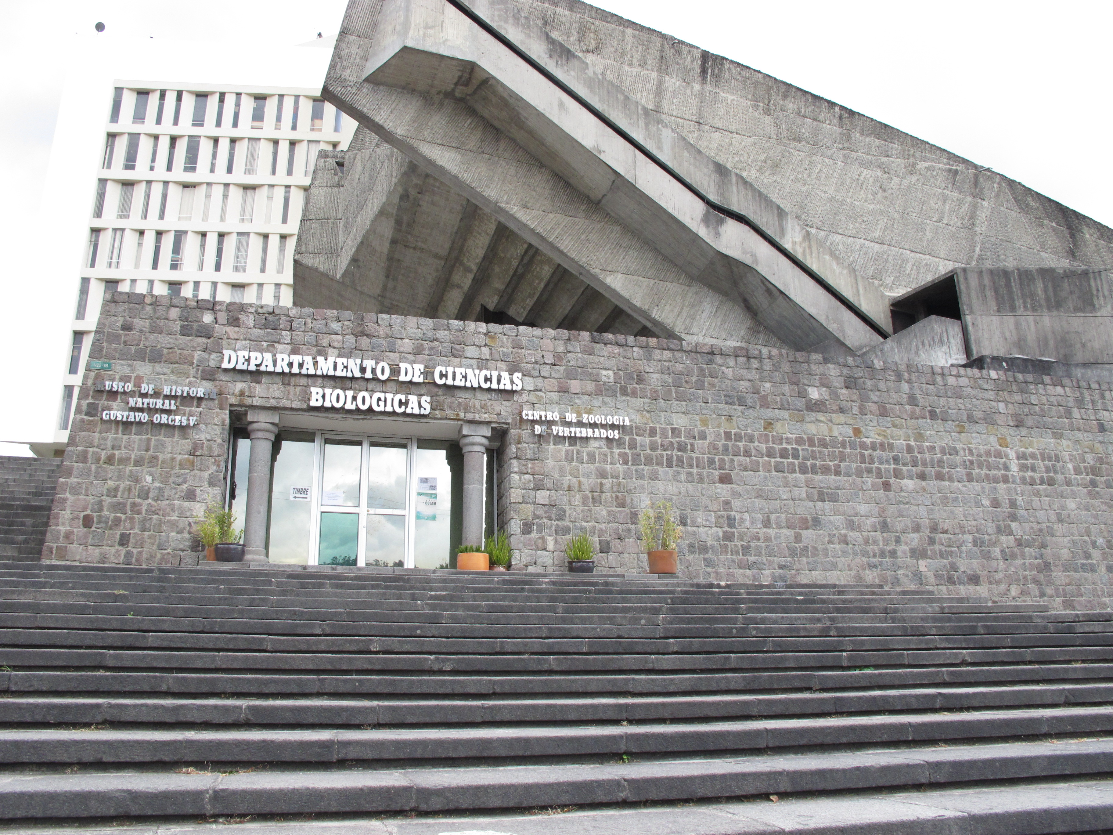 Museo Ciencias Naturales, Escuela Politécnica Nacional Quit, Ecuador